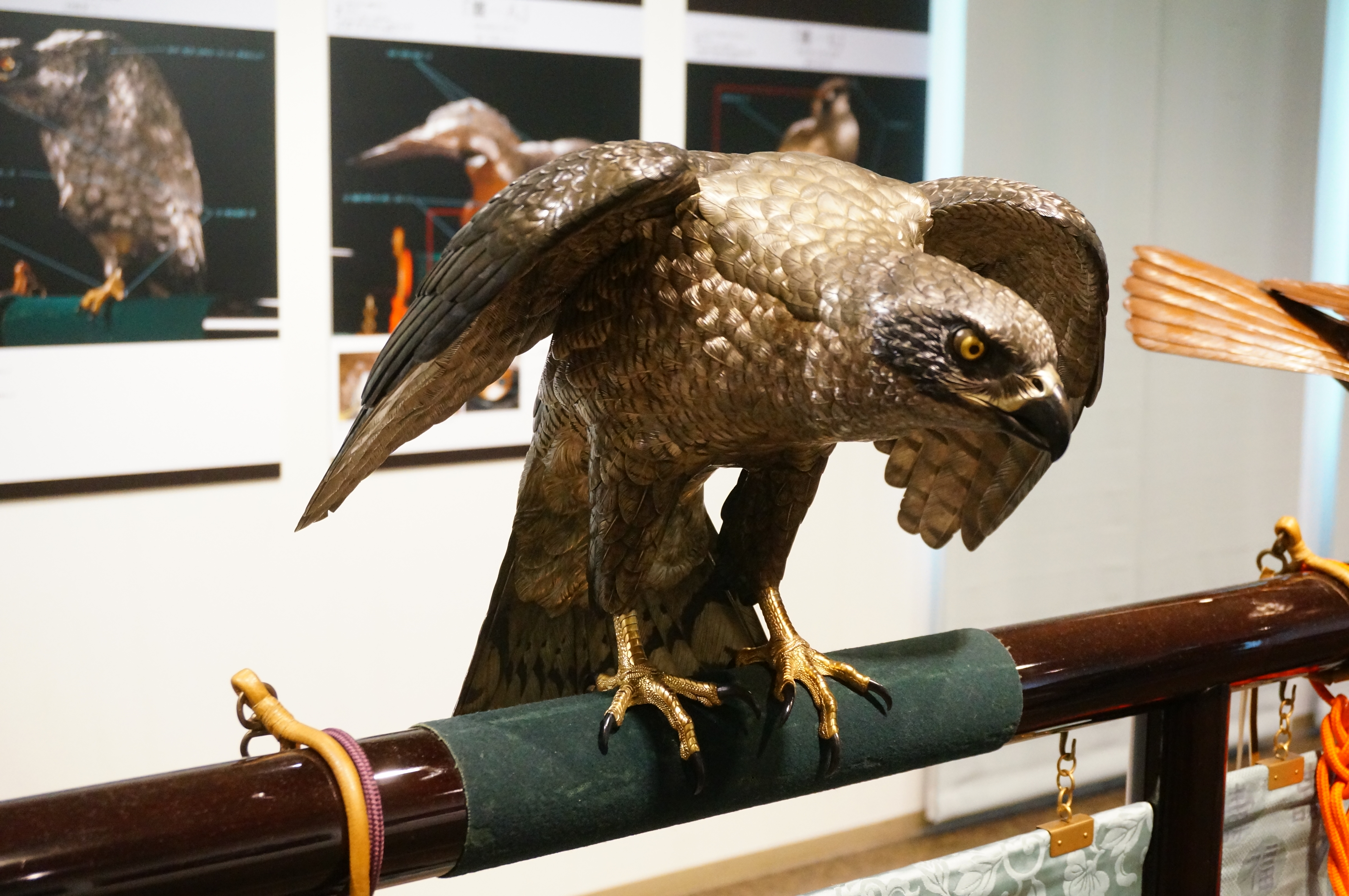 東京国立近代美術館工芸館「名工の明治」展にて